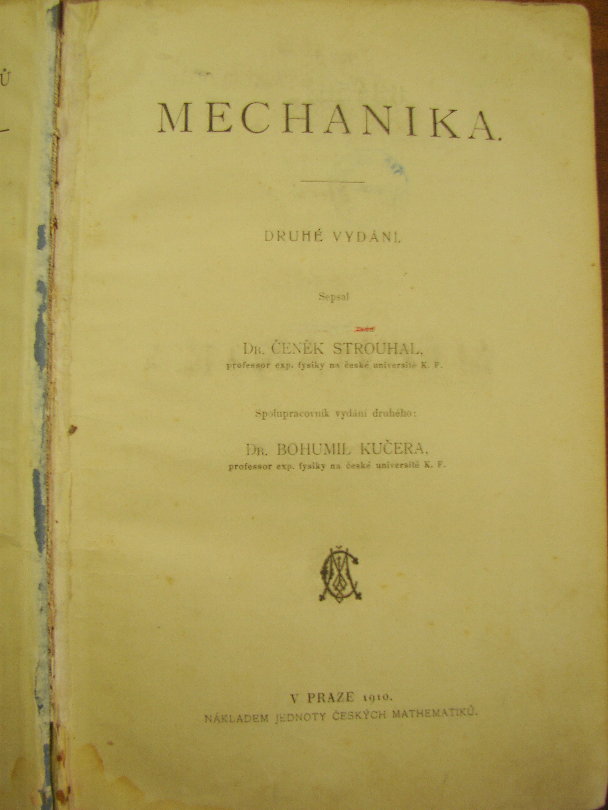 ukázka ze Strouhalovy knížky o mechanice